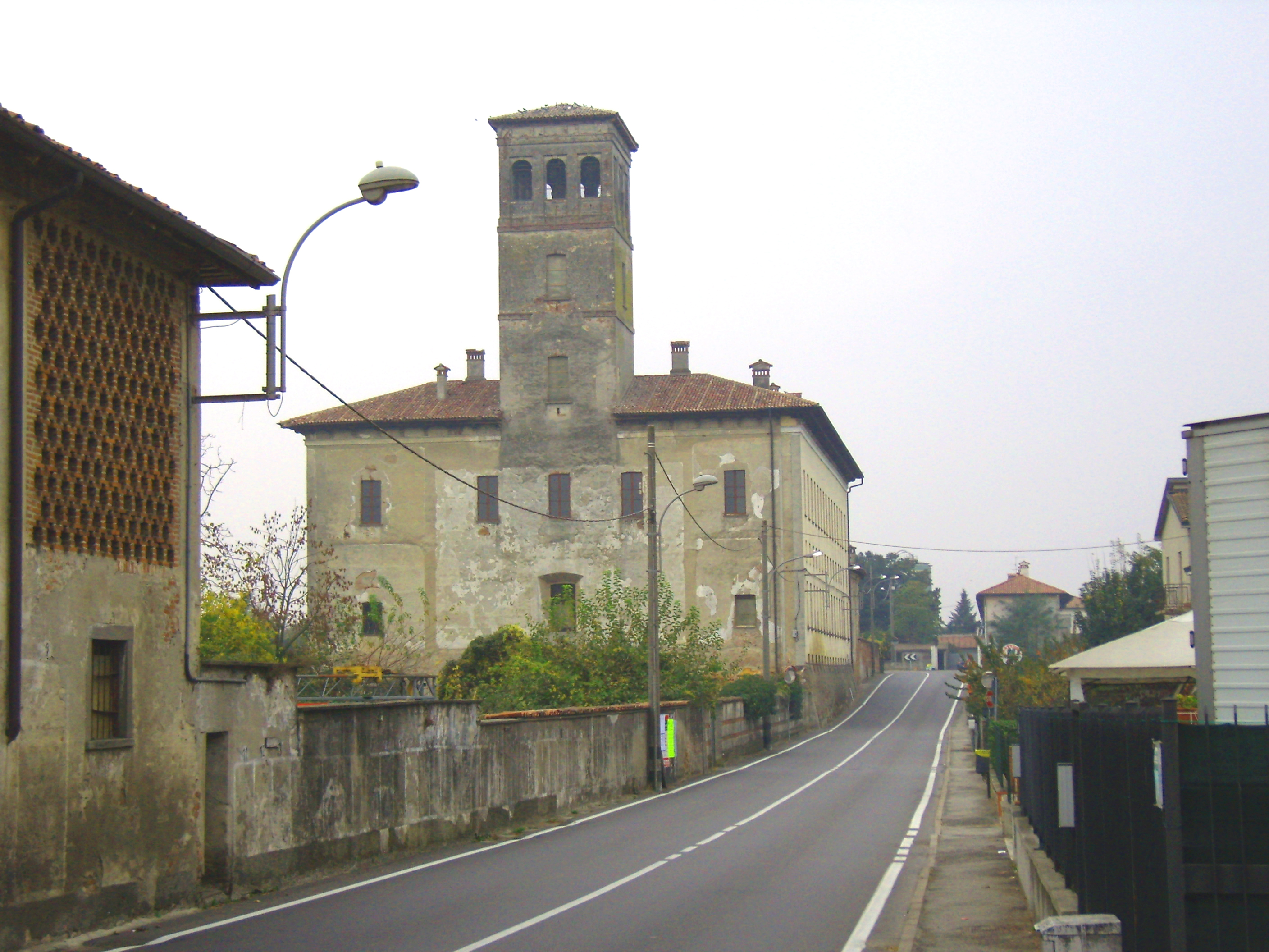 Palazzo Carcassola a Marzano, frazione di Merlino, lungo la provinciale n. 201.